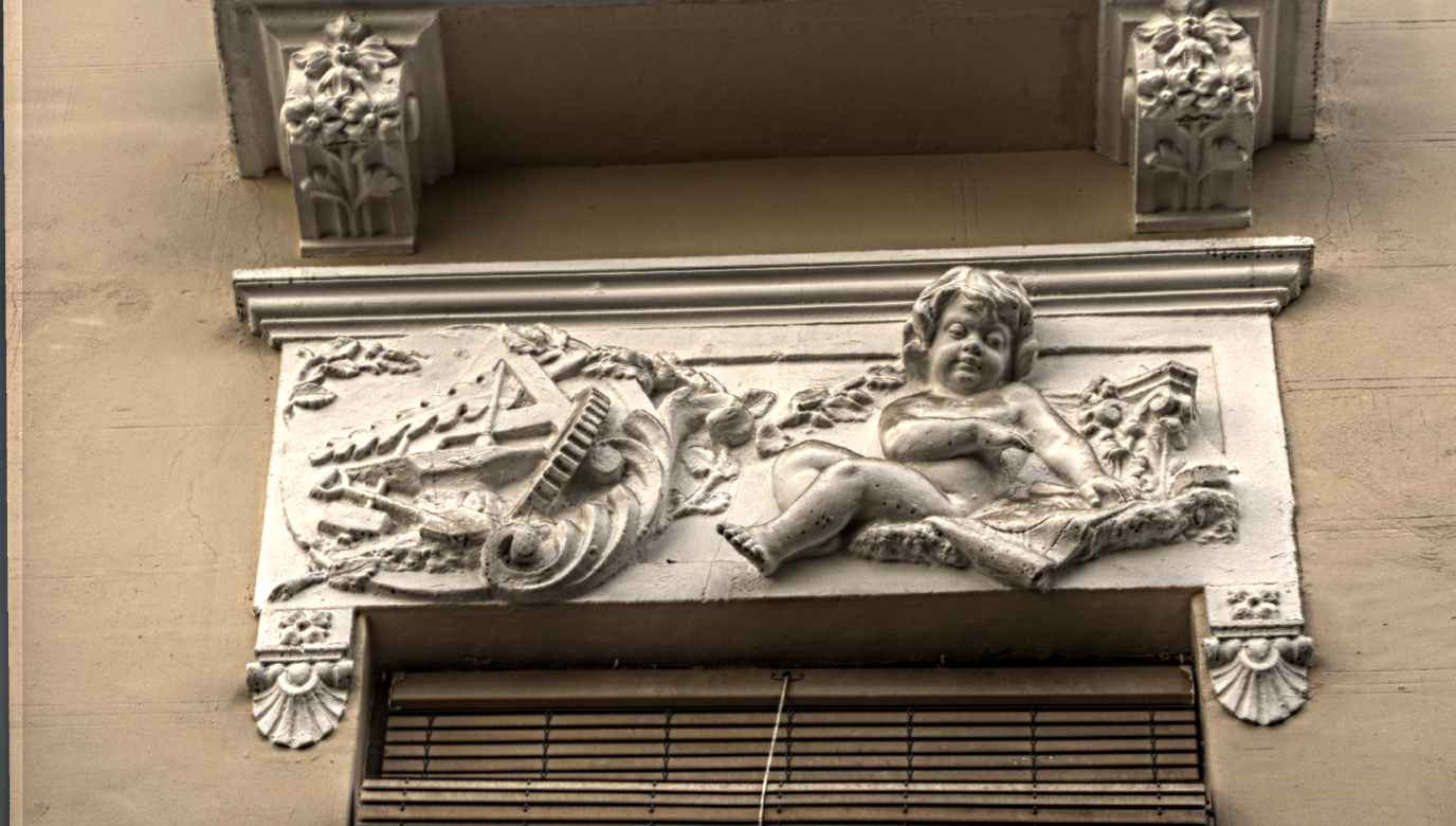 Parte de la casa diseñada por Juan Monserrat